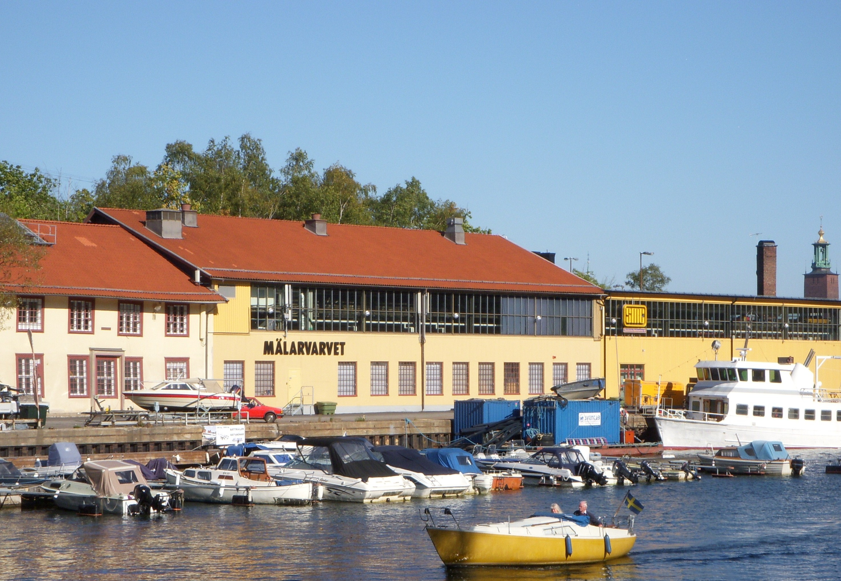 Mälarvarvet på Långholmen i Stockholm